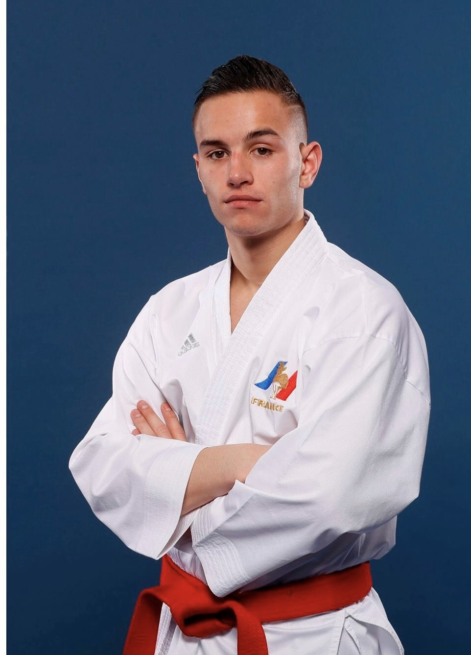 Le karatéka français Steven Da Costa